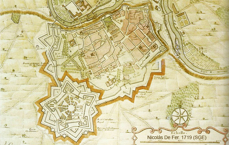 Iruñeko harresien planoa 1719an